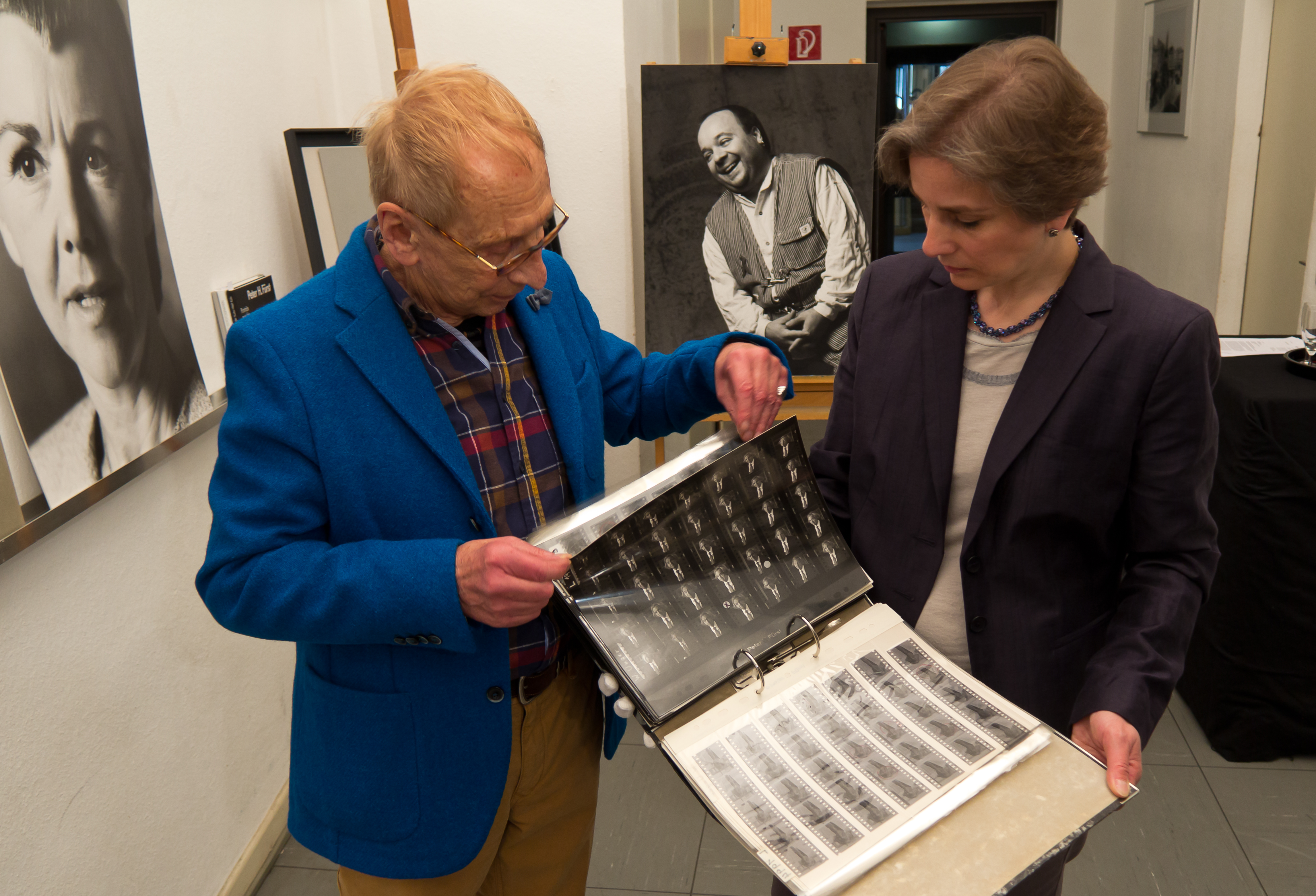 Am 8. April 2014 hat der Rat der Stadt Köln eine Schenkung des Fotografen Peter H. Fürst angenommen. Das Rheinische Bildarchiv konnte damit seinen Bestand um weitere Bilder des Fotografen erweitern. Diese Fotografien ergänzen und vervollständigen Fürsts erste Schenkung aus dem Jahr 2002. Damals erhielt das Rheinische Bildarchiv 126 großformatige Abzüge mehrerer Bildserien, in denen er zwischen 1987 und 1995 dem Phänomen „Kölner Persönlichkeiten“ nachging. Das Kölnische Stadtmuseum stellte die Aufnahmen 1987, 1992 und 1995 aus (1987: „Porträts Kölner Persönlichkeiten. 70 Fotografien", 1992: „berufen und gewählt", 1995: „Fotografien aus der Kultur Welt Köln"). Die jetzige Schenkung umfasst sämtliche Materialien dieser drei Serien, die damit vollständig in städtischen Besitz übergehen. Foto: Die Leiterin des Rheinischen Bildarchivs, Johanna Gummlich-Wagner und der Fotograf Peter H. Fürst schauen sich gemeinsam die Negativmappen der Schenkung an.